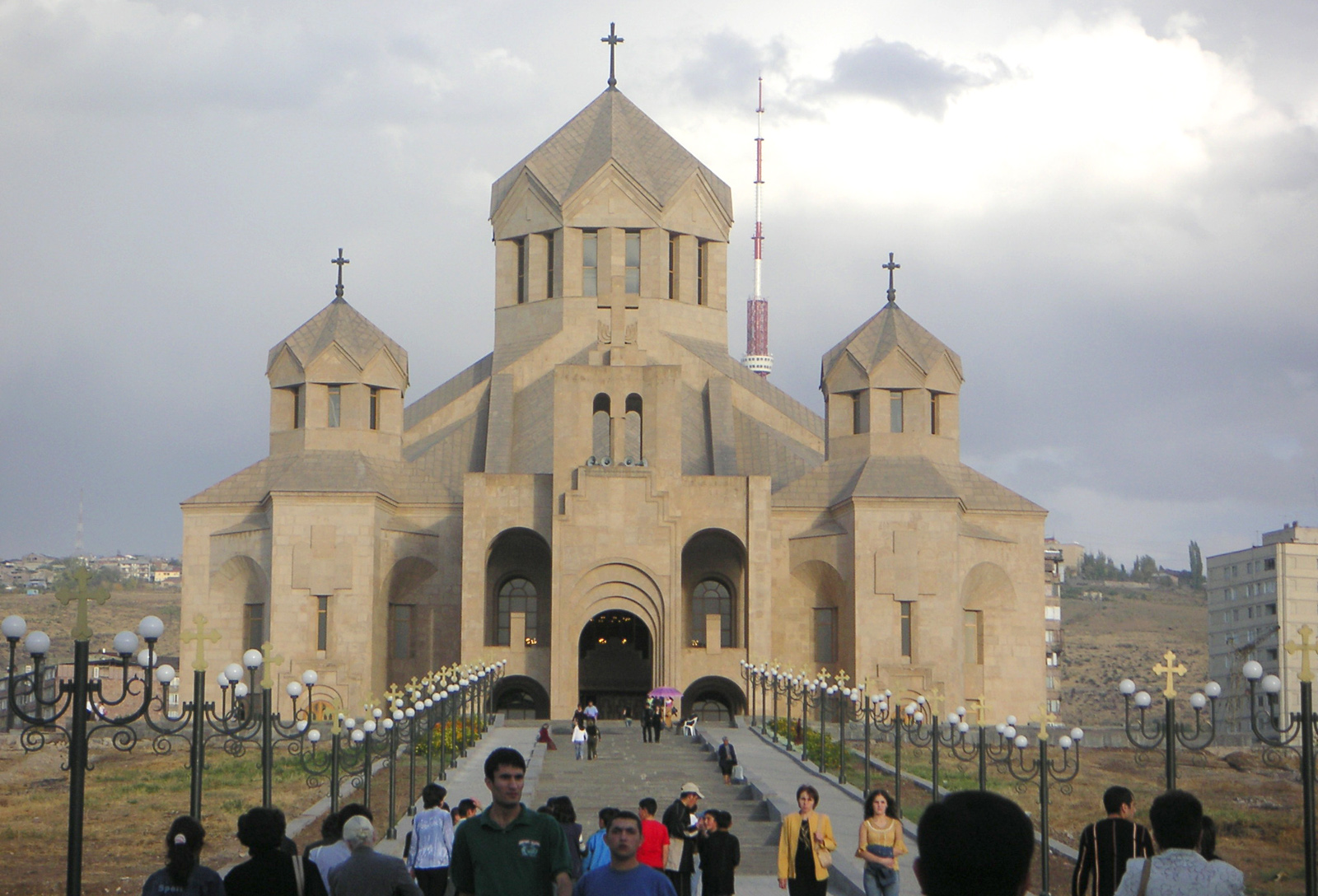 Cathédrale Soupr Krikor Loussavoritch